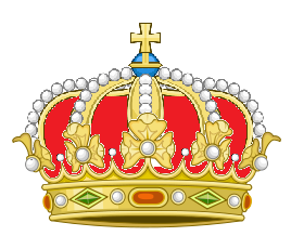 ona di Duca regnante dal 1806 in Germania